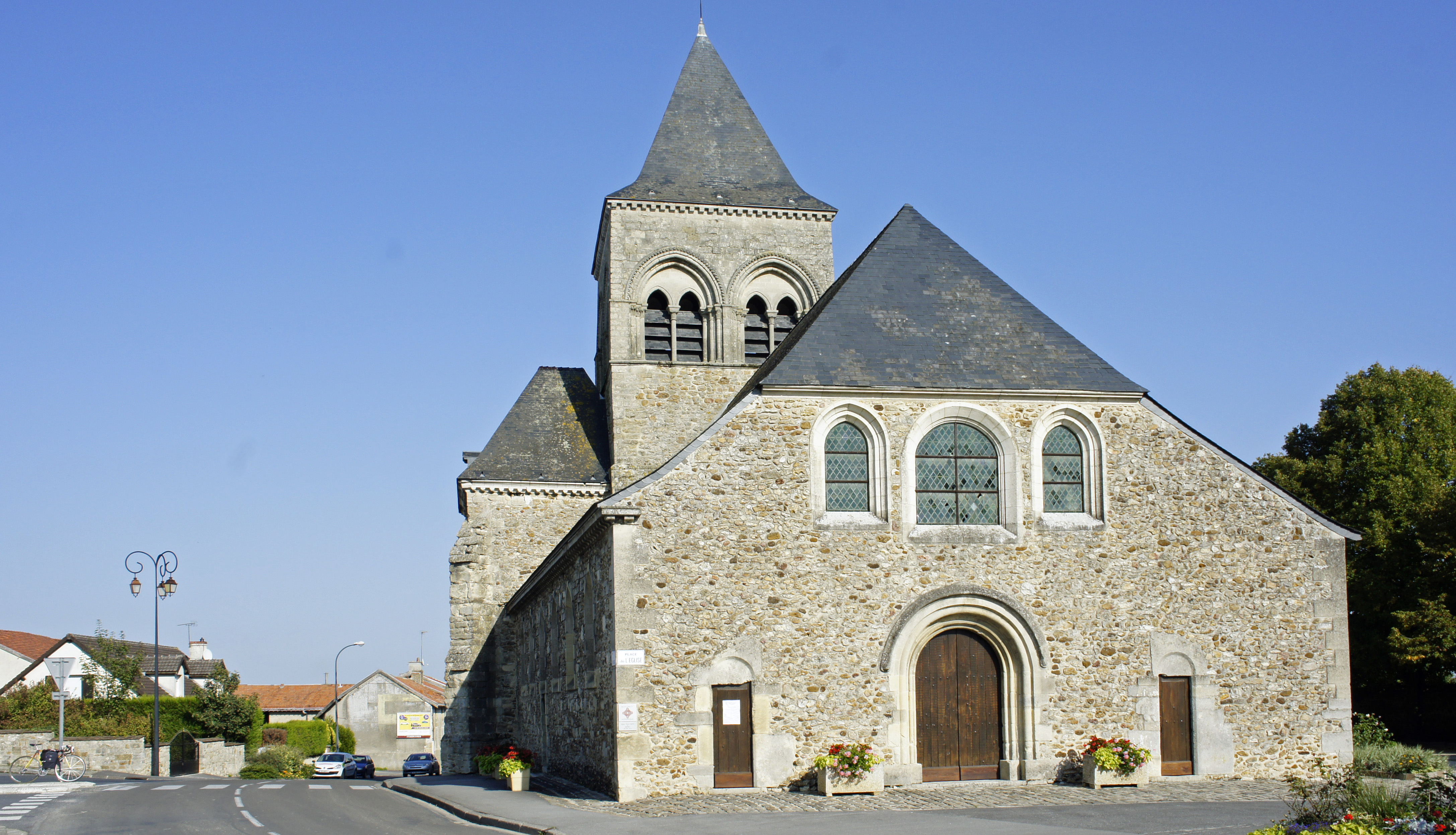 Église de Berru, portail ouest.